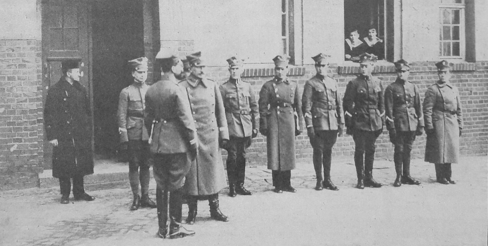 Przegląd Stacji Lotniczej Ławica przez gen. Dowbor-Muśnickiego w marcu 1919. Gen. Józef Dowbor-Muśnicki, płk. Gustaw Macewicz, ppor. Jerzy Dziembowski, X., ppor. Wiktor Pniewski, ppor. Józef Mańczak, ppor. Edmund Norwid-Kudło, ppor. Wojciech Biały, urz. wojsk. Hullej.